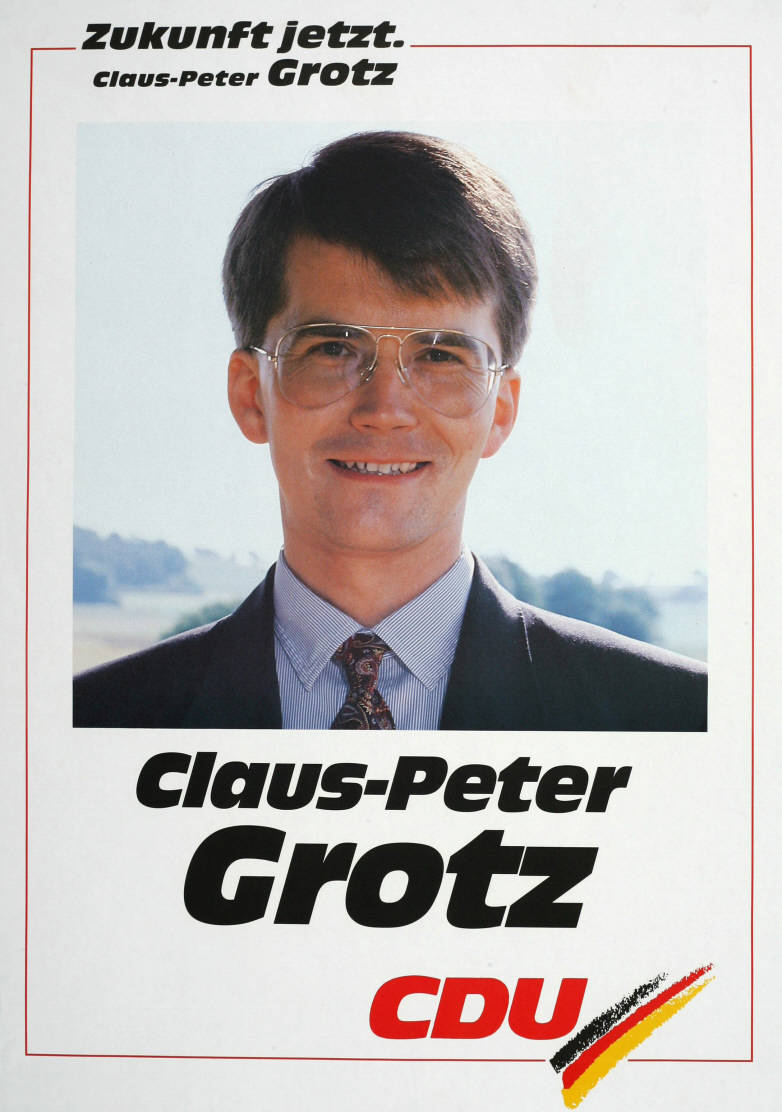 Zukunft jetzt. Claus-Peter Grotz CDU Abbildung: Porträtfoto - Nationalfarben Plakatart: Kandidaten-/Personenplakat mit Porträt Objekt-Signatur: 10-001: 3513 Bestand: Plakate zu Bundestagswahlen (10-001) GliederungBestand10-18: Plakate zu Bundestagswahlen (10-001) » Die 12. Bundestagswahl am 2. Dezember 1990 » CDU » Mit Porträtfoto Lizenz: KAS/ACDP 10-001: 3513 CC-BY-SA 3.0 DE